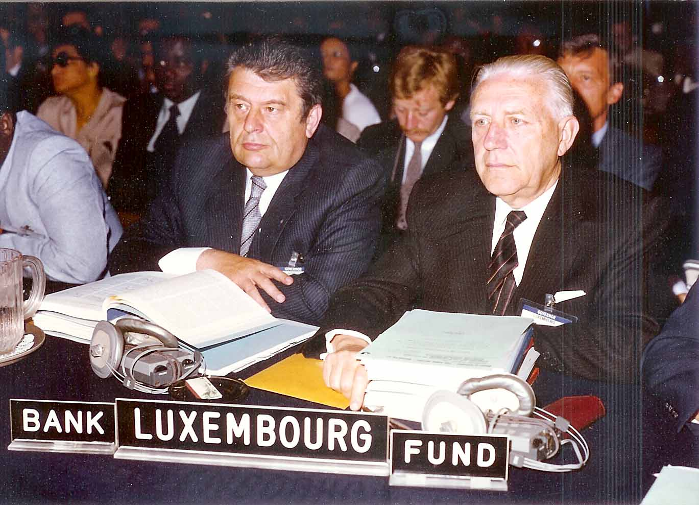 FMI (1980), Lëtzebuerger Gouverneuren